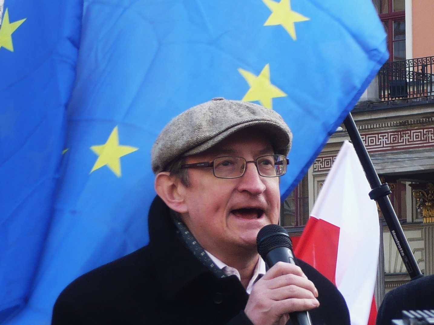 Józef Pinior na demonstracji KOD we Wrocławiu, 19.12.2015 r.